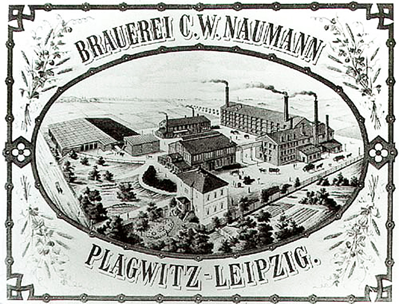 Die Brauerei C. W. Naumann in Leipzig-Plagwitz um 1900